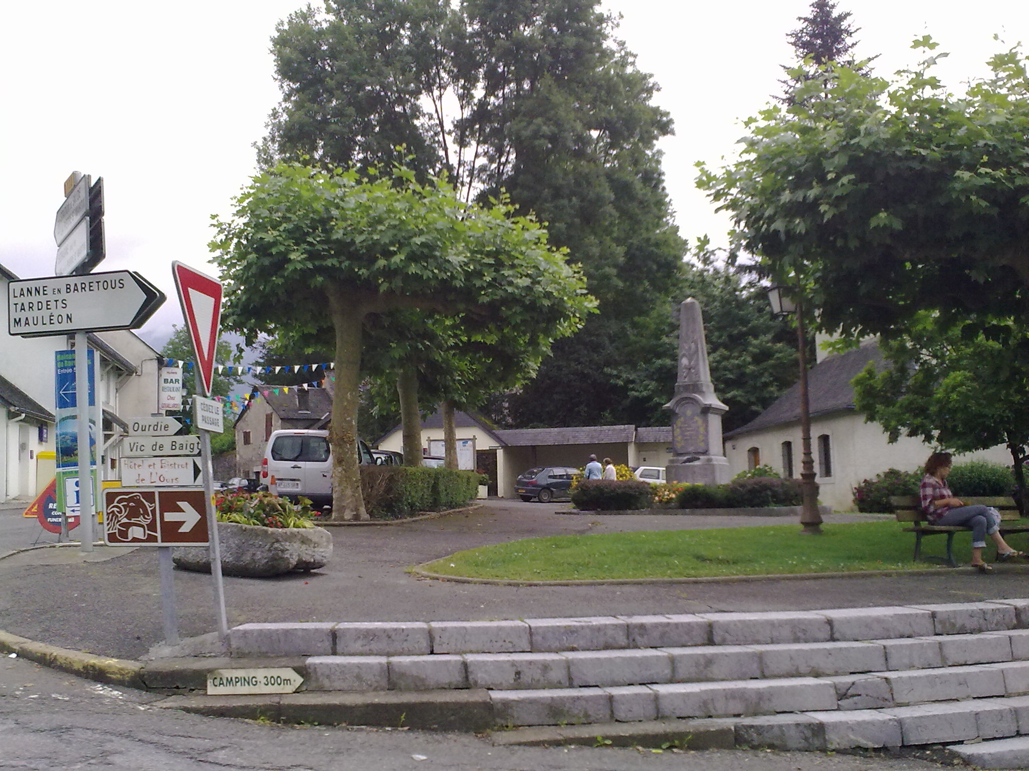 Arette le 4 juillet 2010.